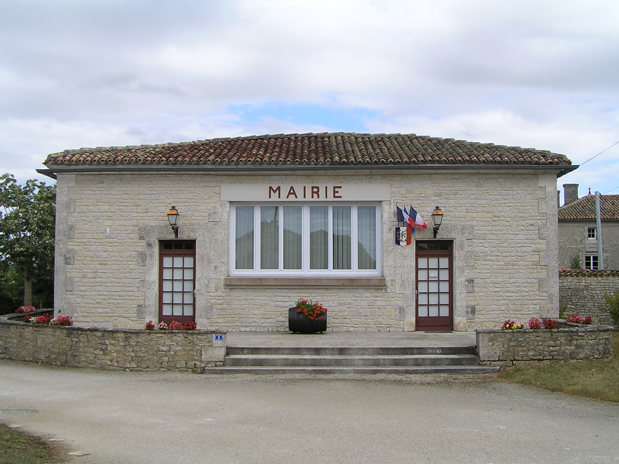 mairie de Vervant